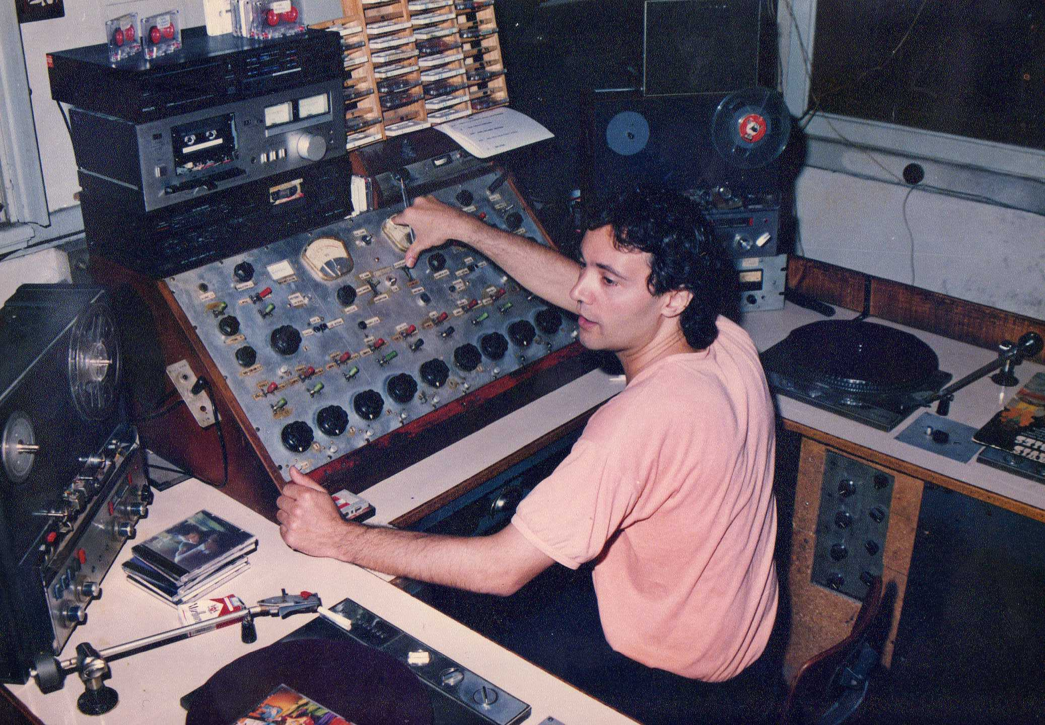 Radio Universidad Nacional de La Plata